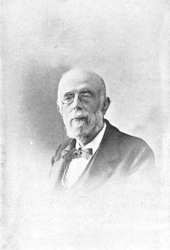 Francisco Codera.—COMPAÑY